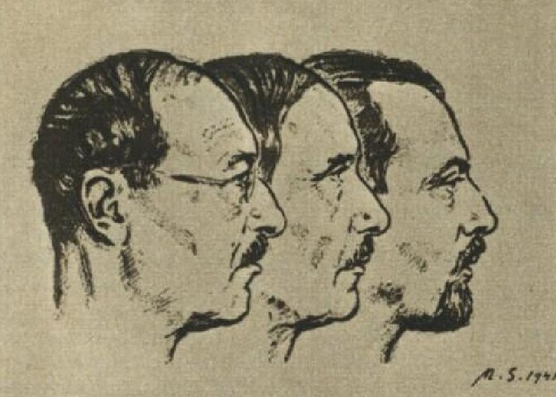 Viktor Stretti, Jar. Stretti-Zamponi a Mario Stretti